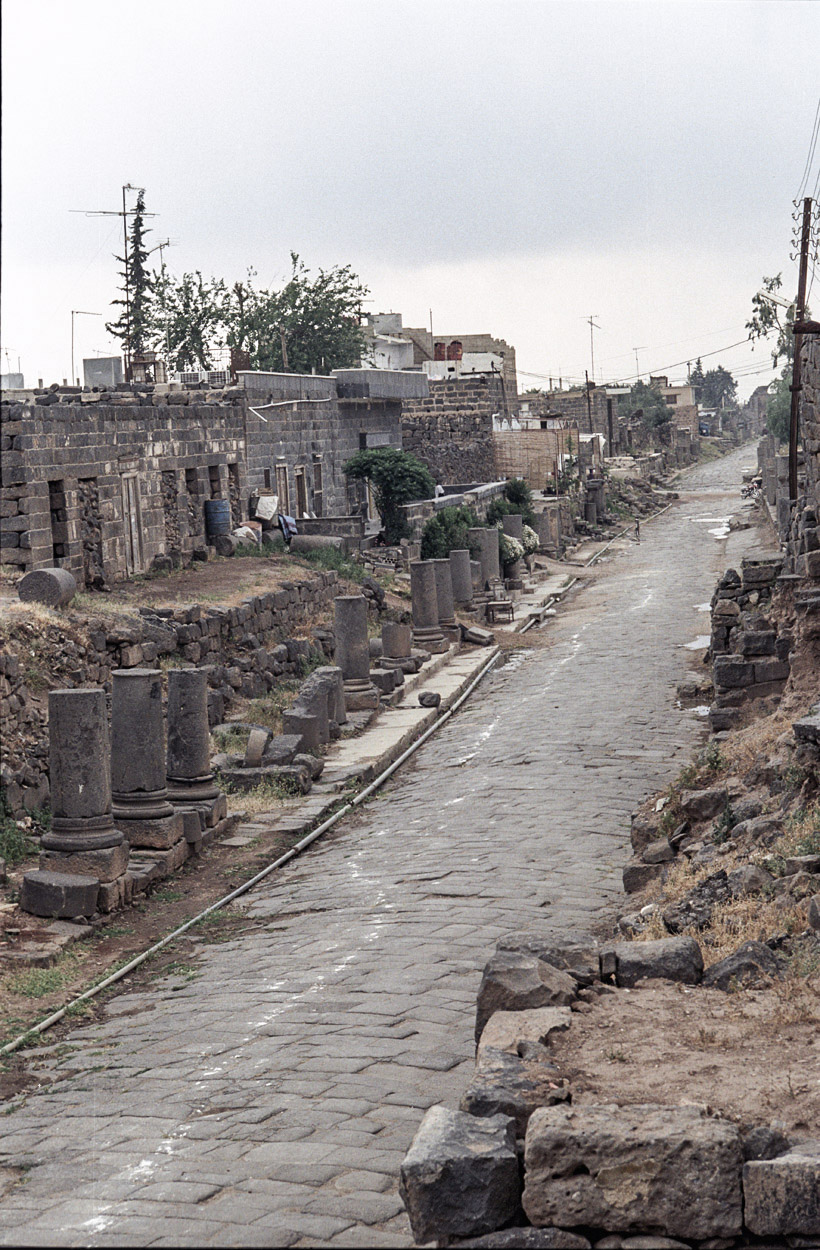 Syria, Bosra